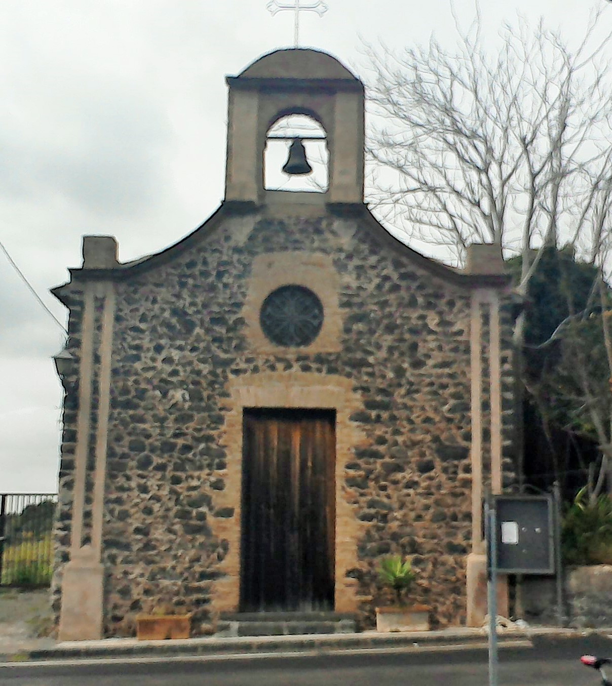 La chiesa di Santa Margherita - Misterbianco